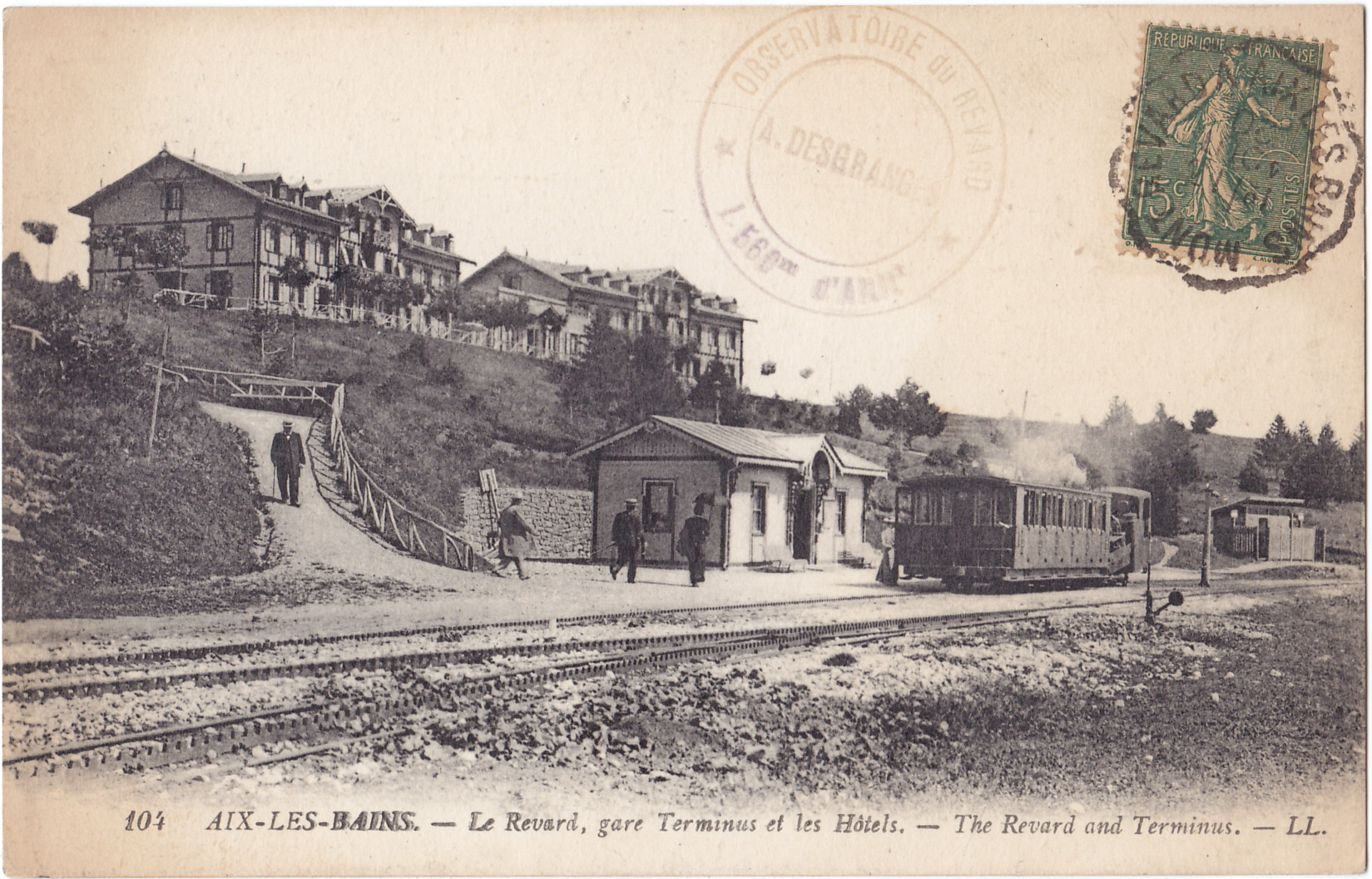 Carte postale ancienne éditée par LL n°104 :AIX-LES-BAINS - Le Revard, gare terminus et les Hôtels